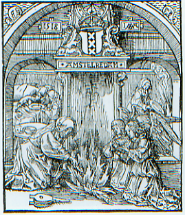 Stille Omgang